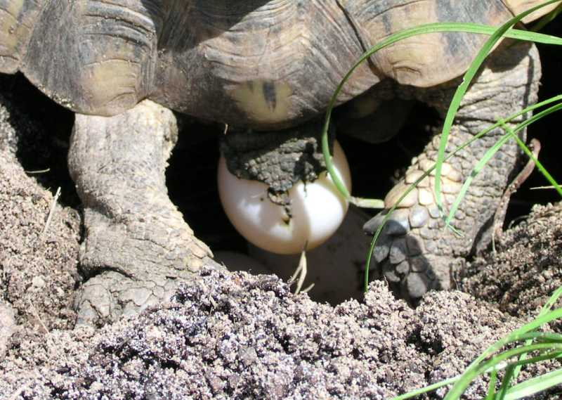 Eiablage bei Maurischer Landschildkröte